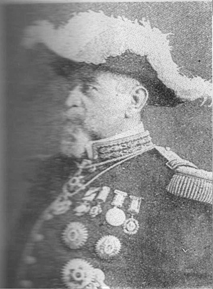 General Lauro Villar